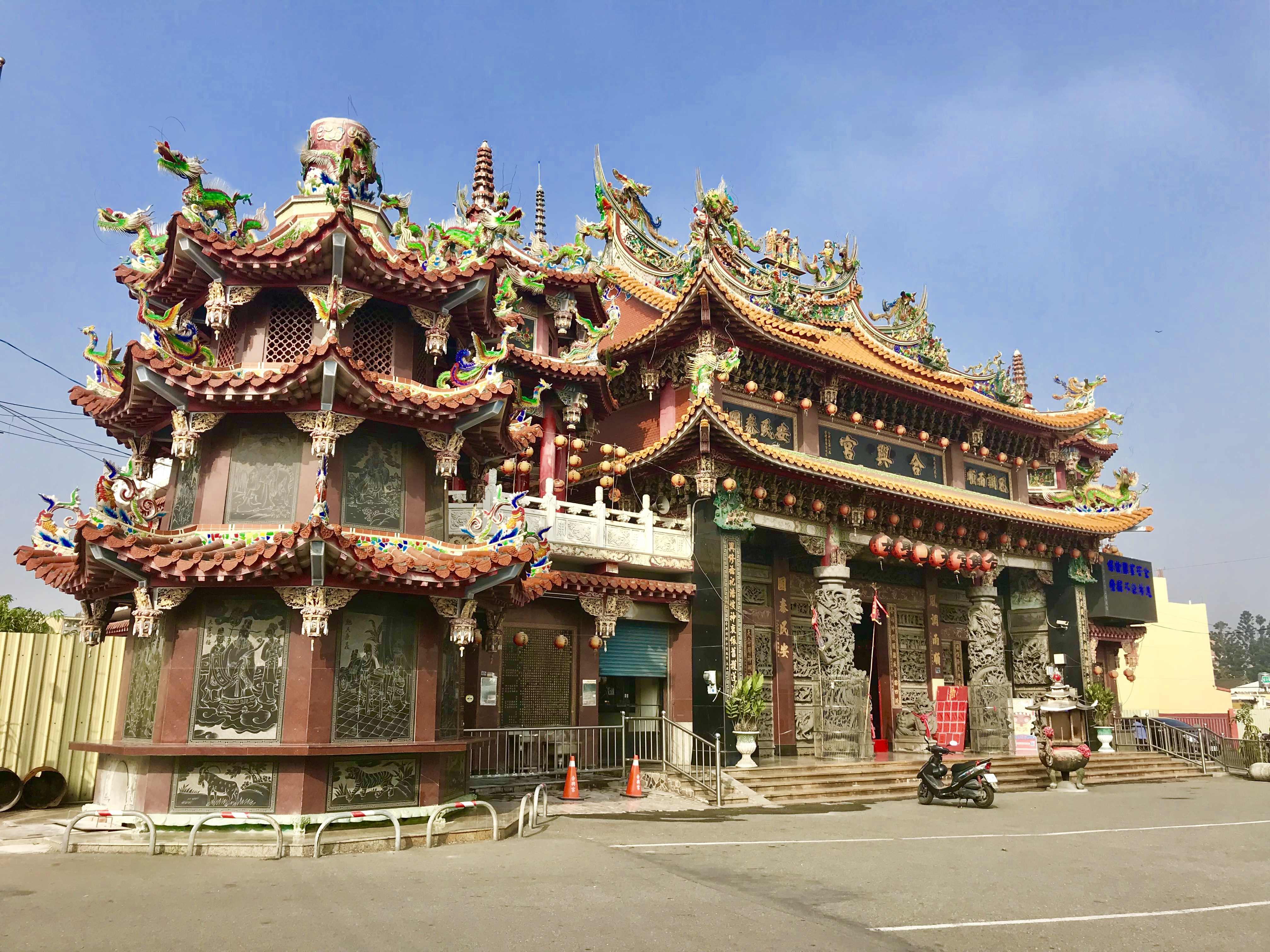 中文（台灣）: 埤頭合興宮斜照